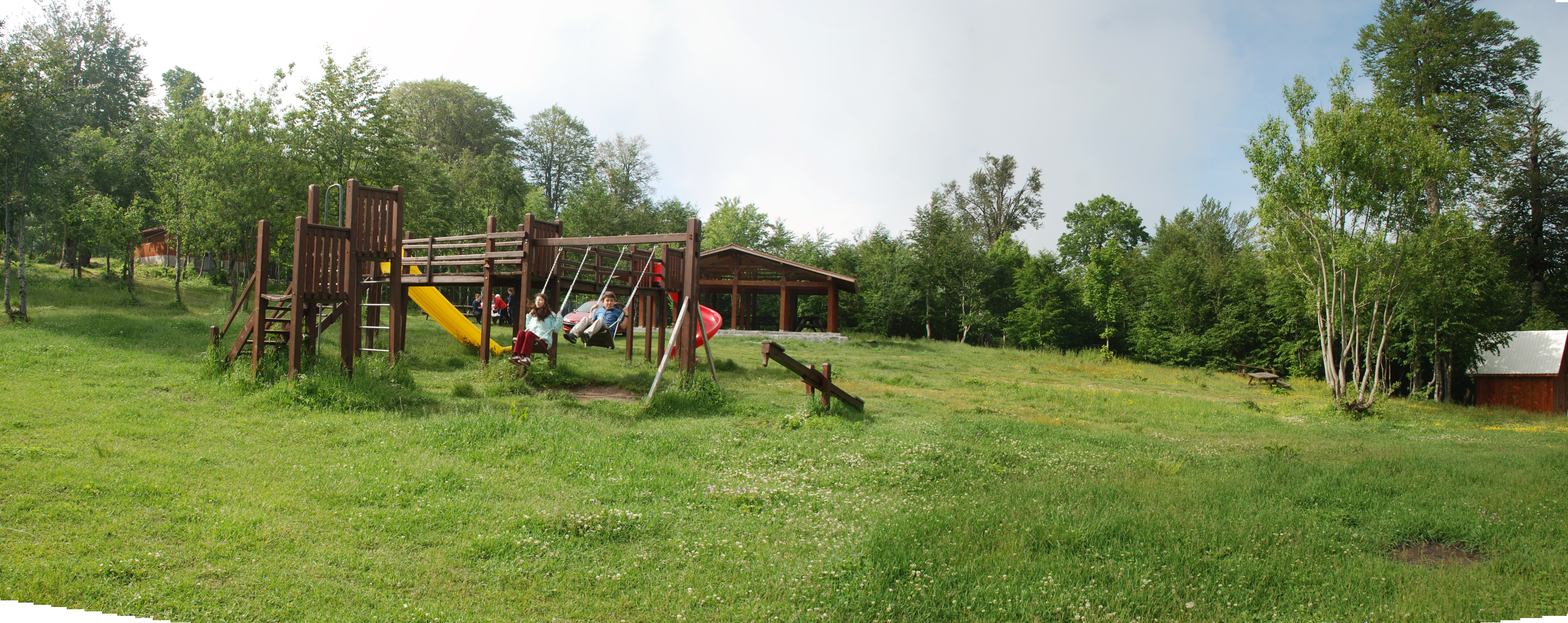 Kuzuyayla